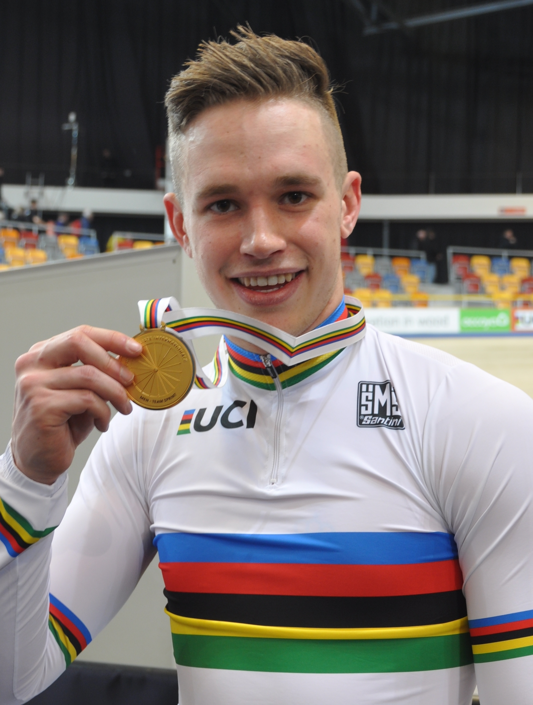 Harrie Lavreysen, niederländischer Radsportler, Goldmedaille Teamsprint